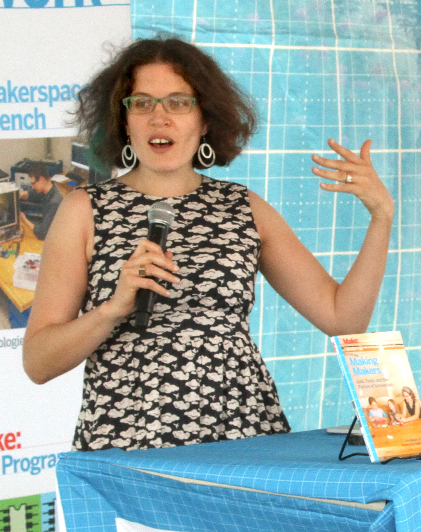 Making Makers